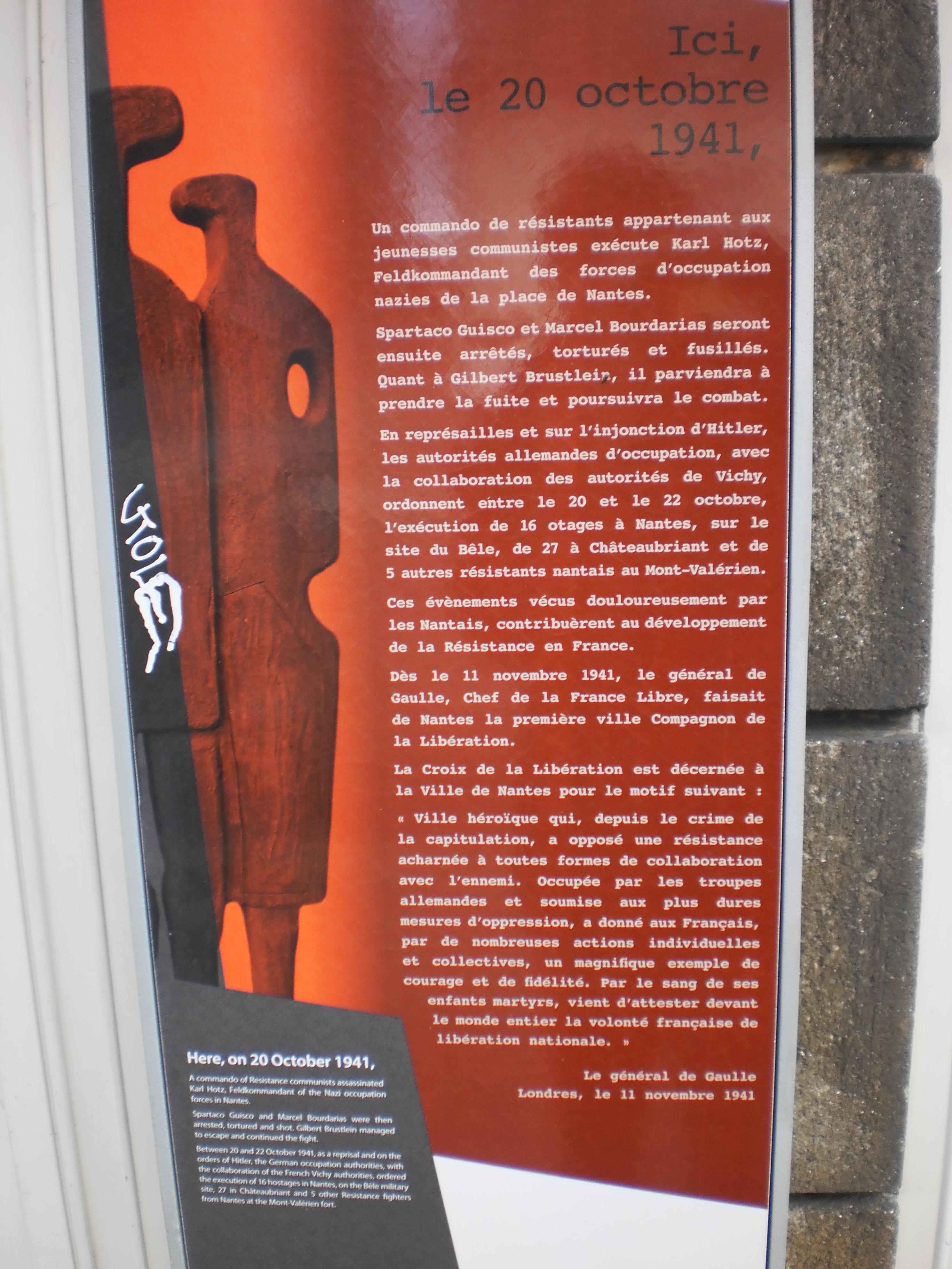 Plaque commémorative de l'exécution de Karl Hotz - Rue du Roi-Albert - Nantes (France)